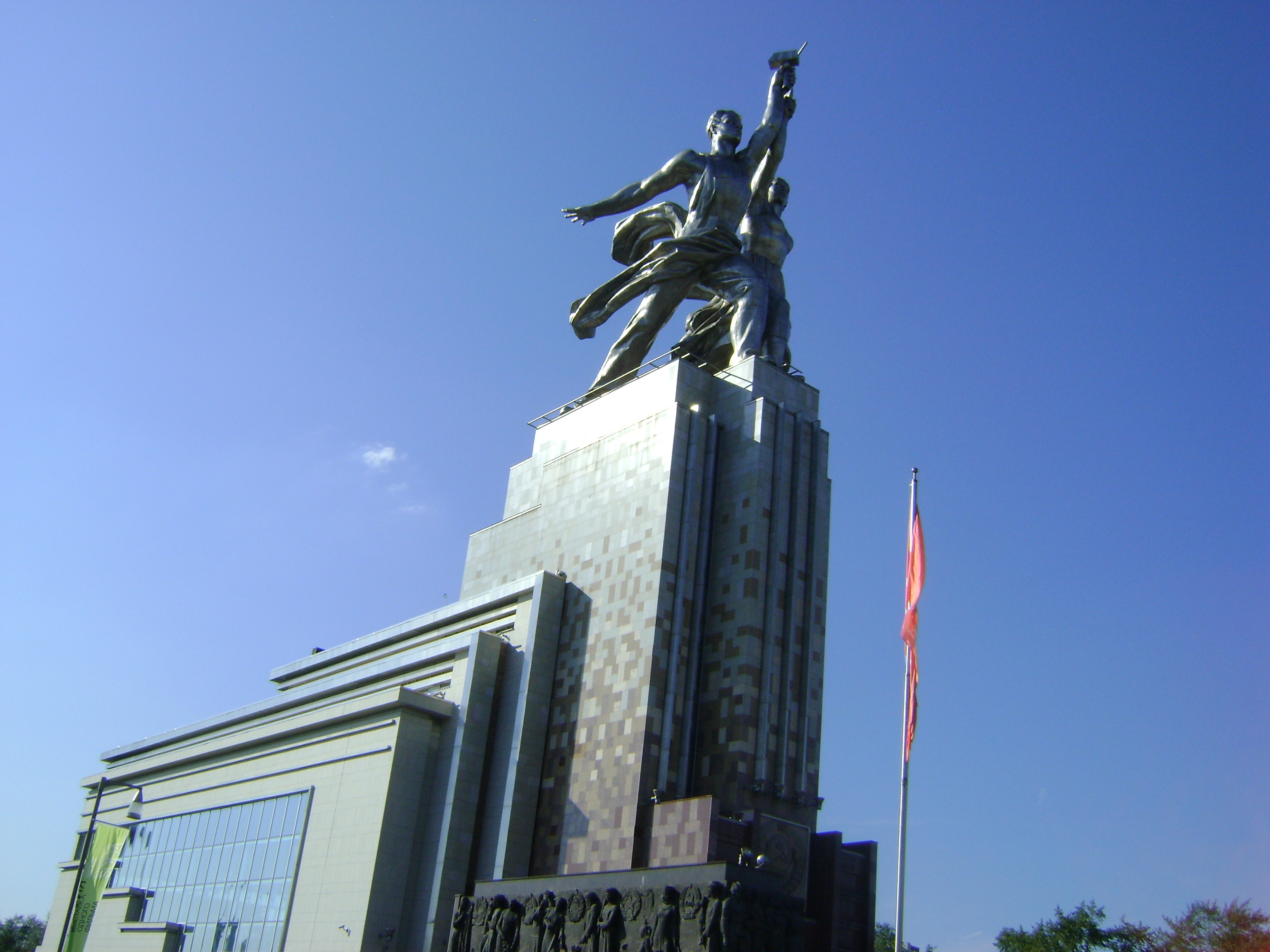 Москва, 2016 рік.